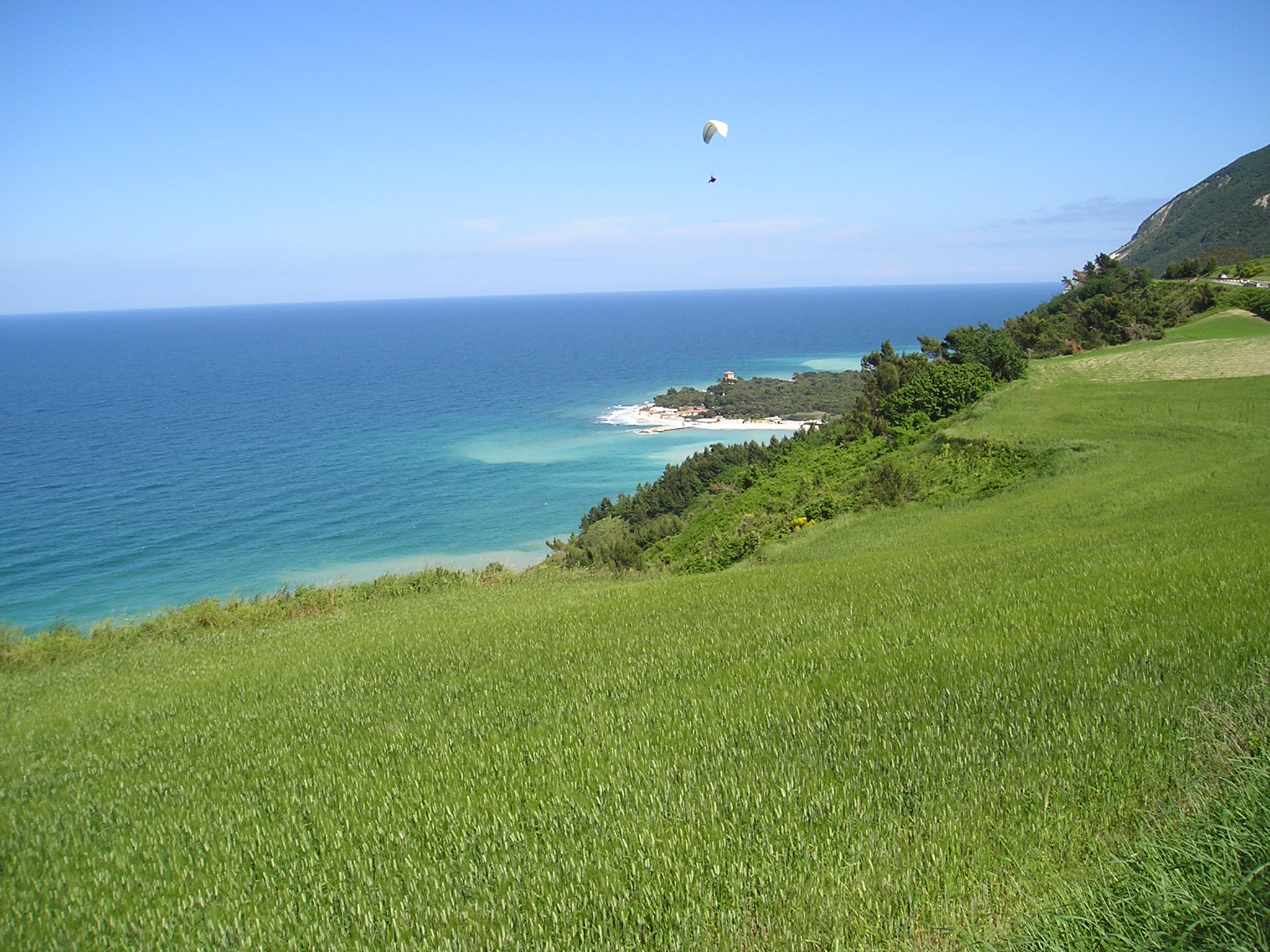 Vista sul mare dal Conero; autore Massimo Macconi - maggio 2005